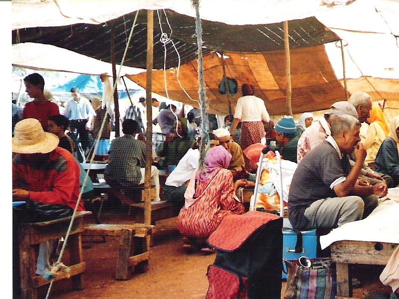 license:GFDL image: personnelle de Hadraj Prise à Khénifra en 2006